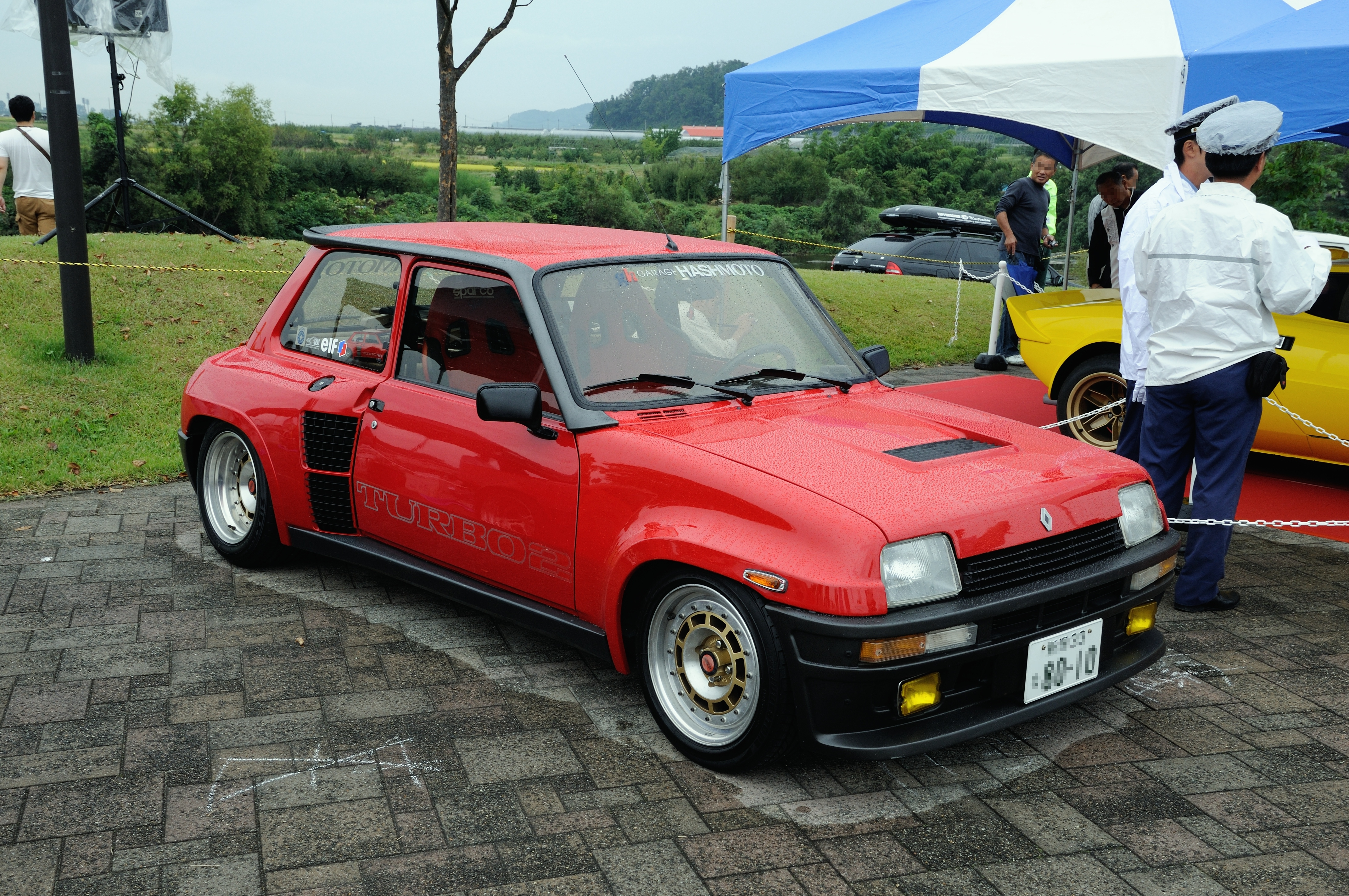 Renault 5 TURBO